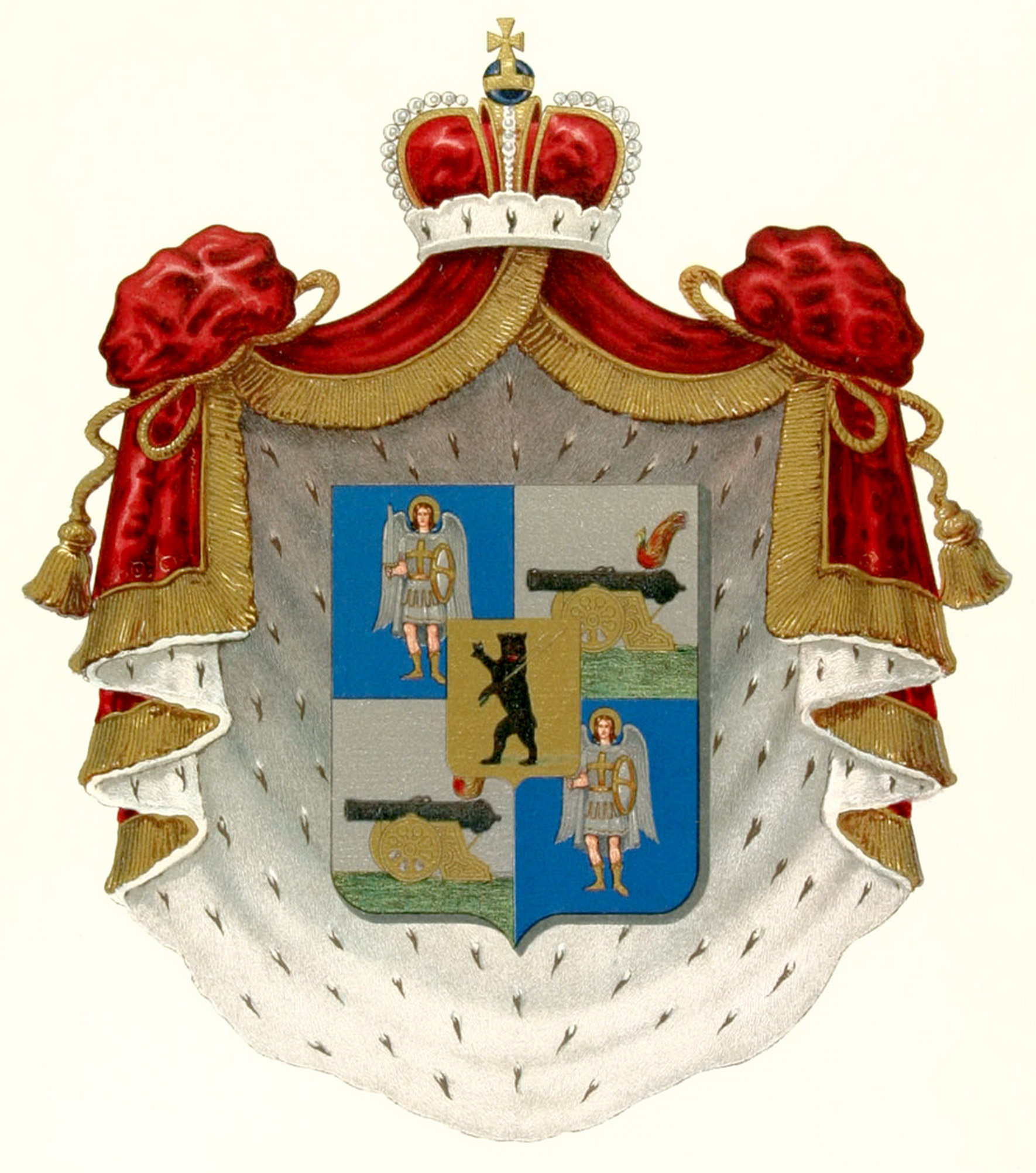 Герб князей Львовых